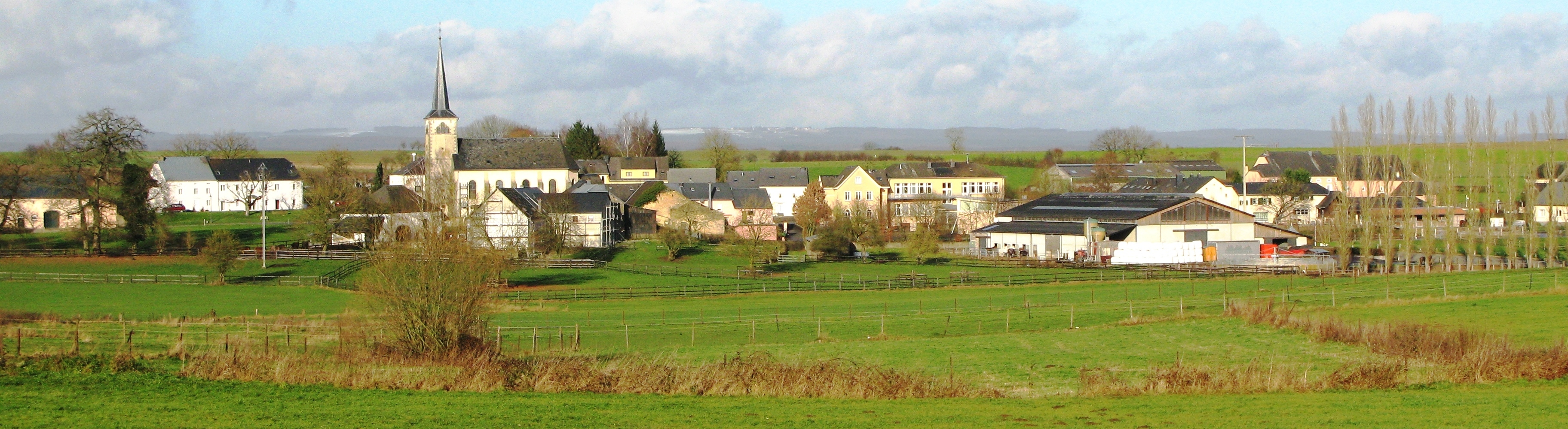 Ielwen vum Bock aus gesinn, am Dezember 2008. Ielwen Ielwen